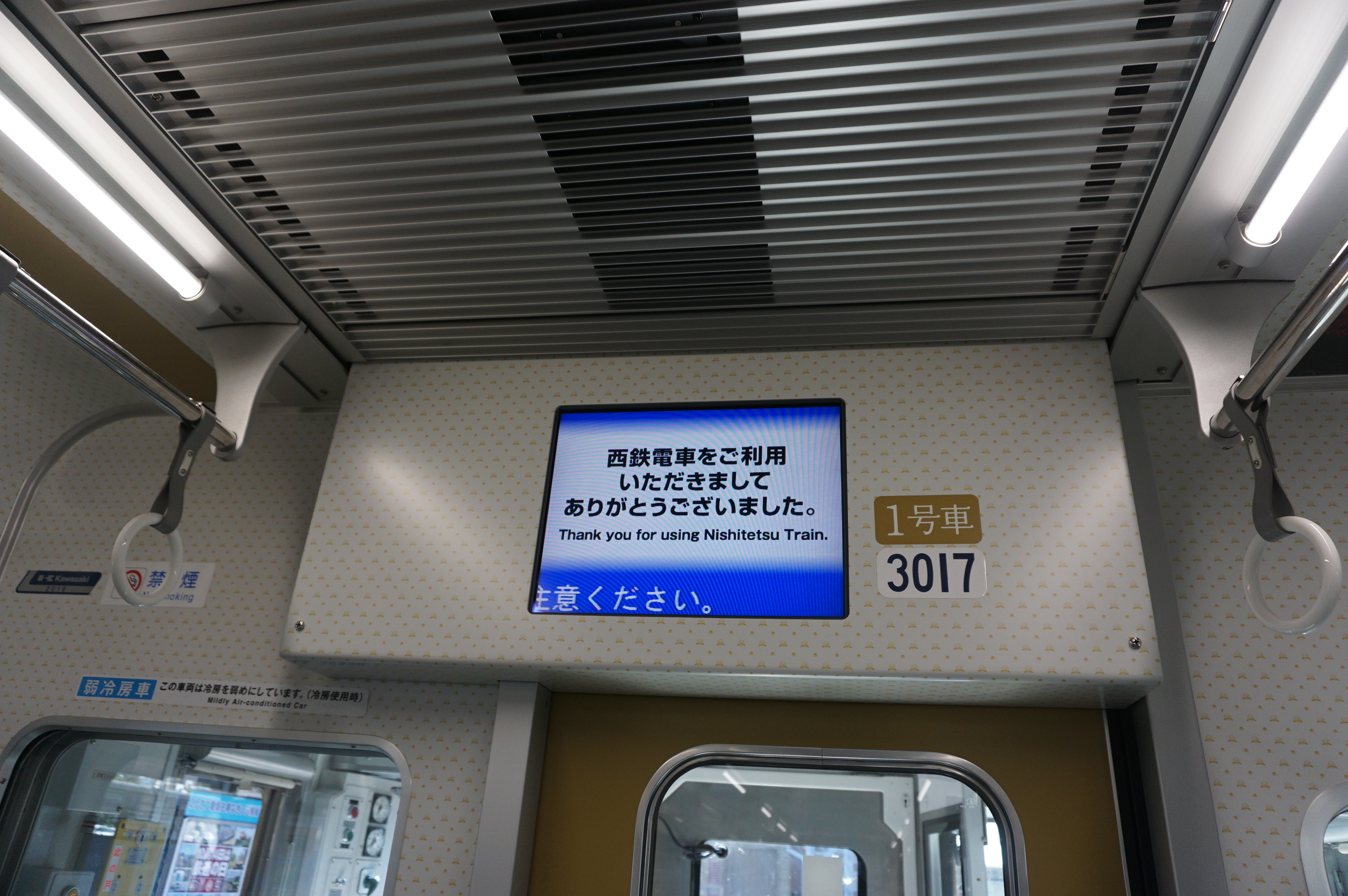 LCD案内表示器（3017号車） Sony ILCE-6000